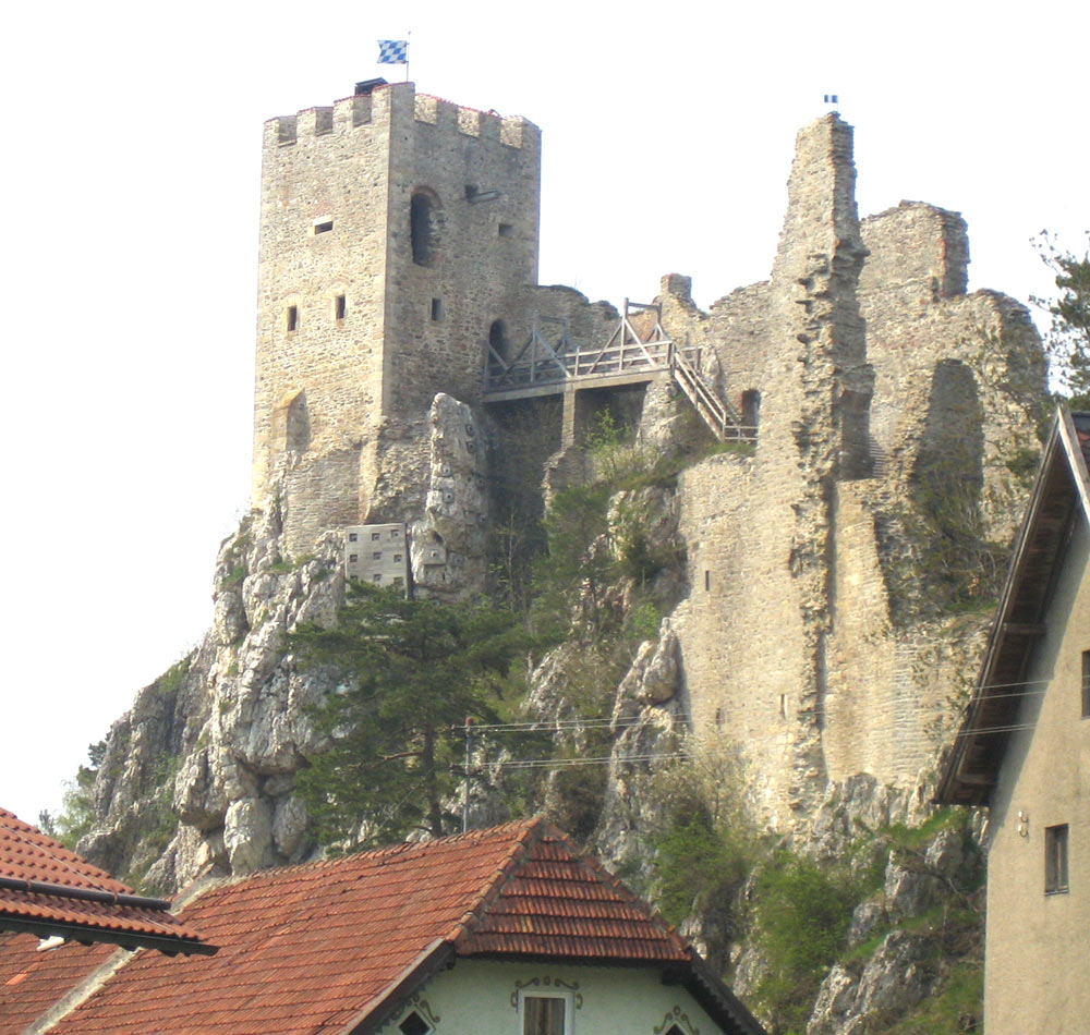 Burgruine Weißenstein bei Regen, Südseite